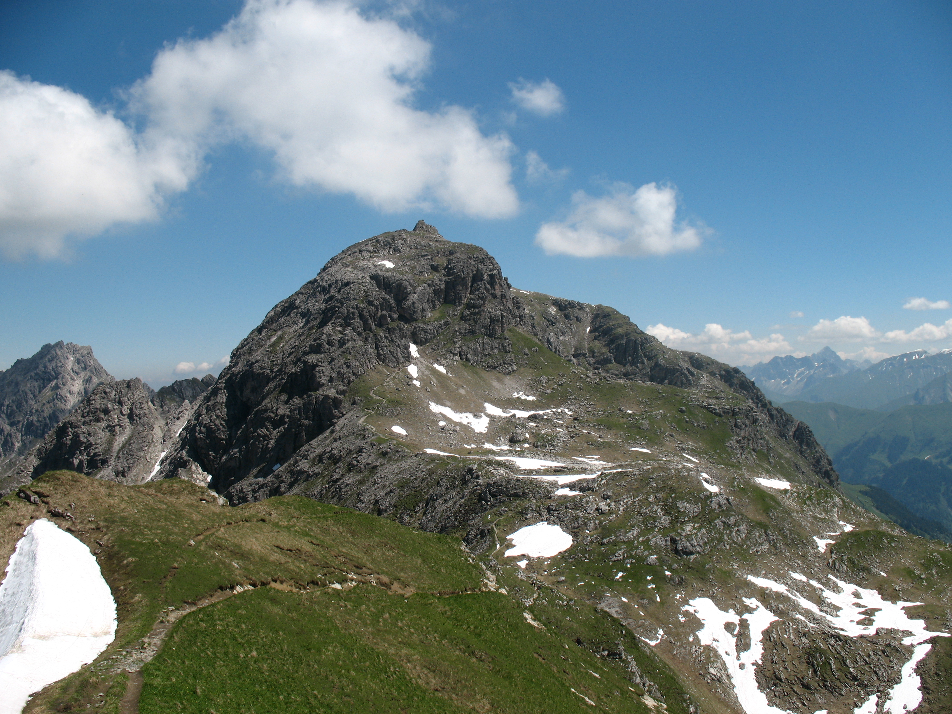 Blick vom Weg zum Kemptner Kopf auf den Ersten Schafalpenkopf (2272 m).